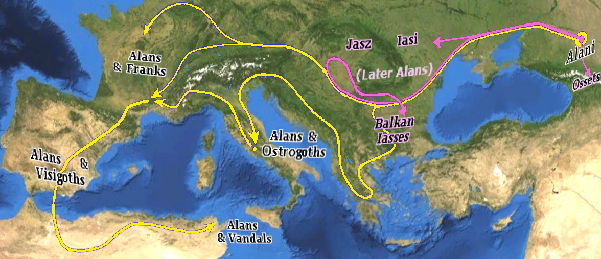 Migrations des Alains selon Nathalie Kálnoky : Des princes scythes aux capitaines des Iasses, in : Droit et cultures [cote INIST : 24217] n° 52, L'Harmattan publ., Paris 2006. Fond de carte : [1]